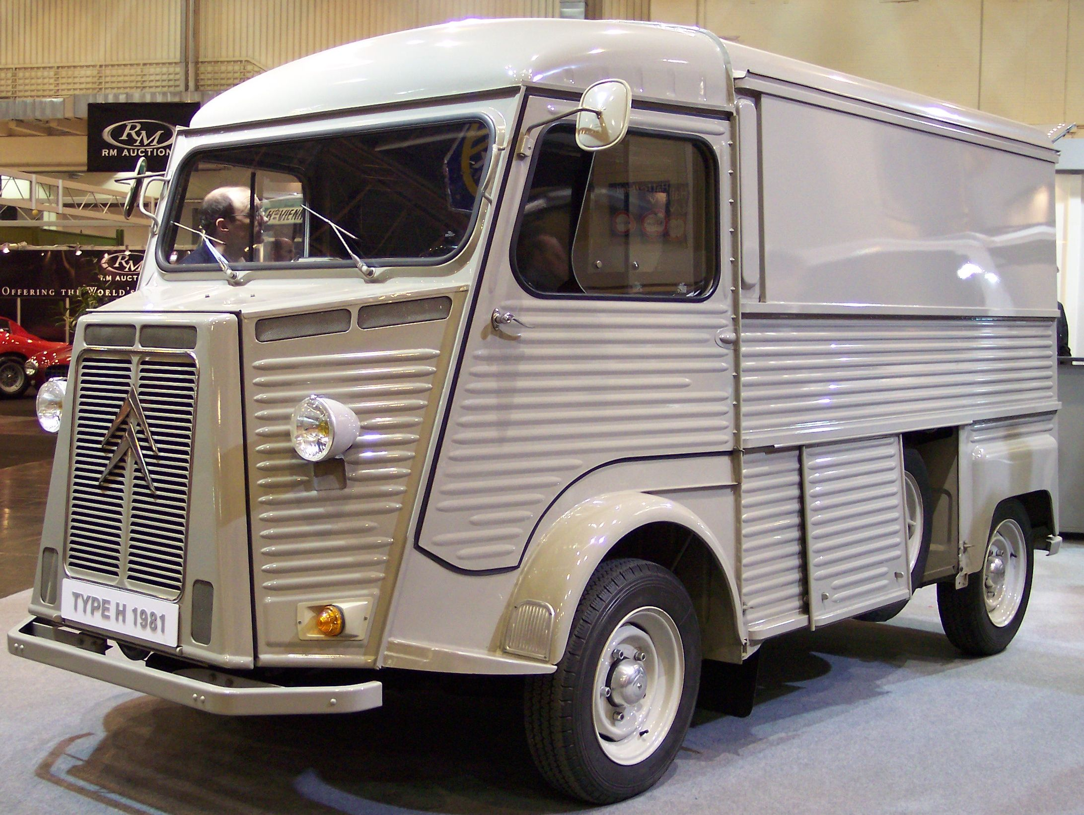 Citroën Typ H 1981